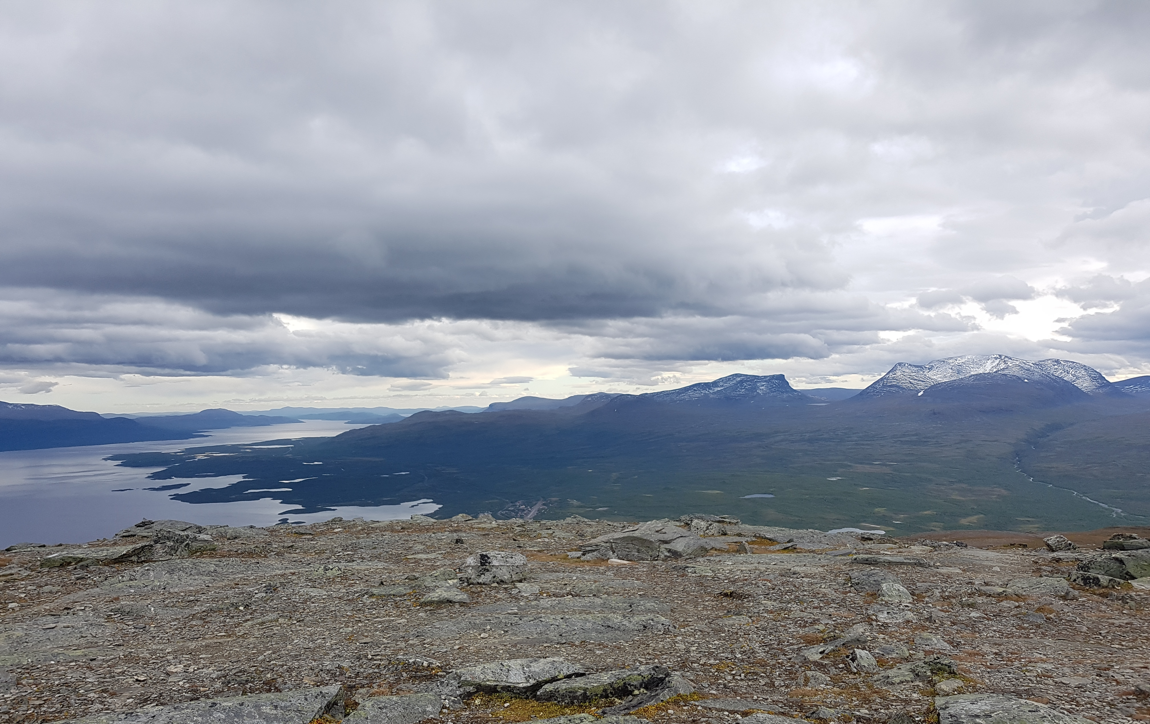 Vaade on rahvuspargi poole ehk ida suunas. Rahvuspargi ala jääb orgu. Vasakul Torneträski järv.